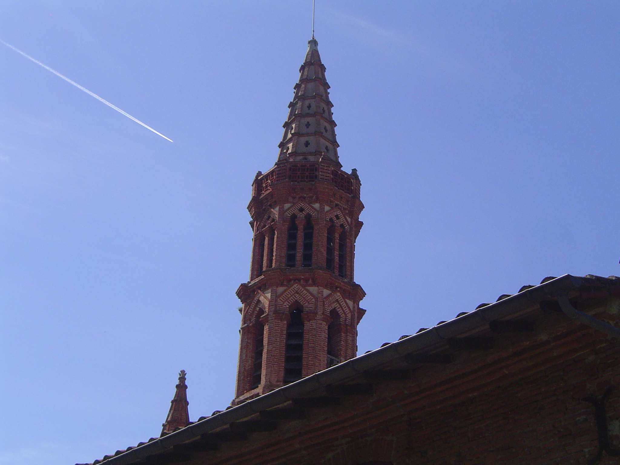 Vue du clocher de Corronsac.